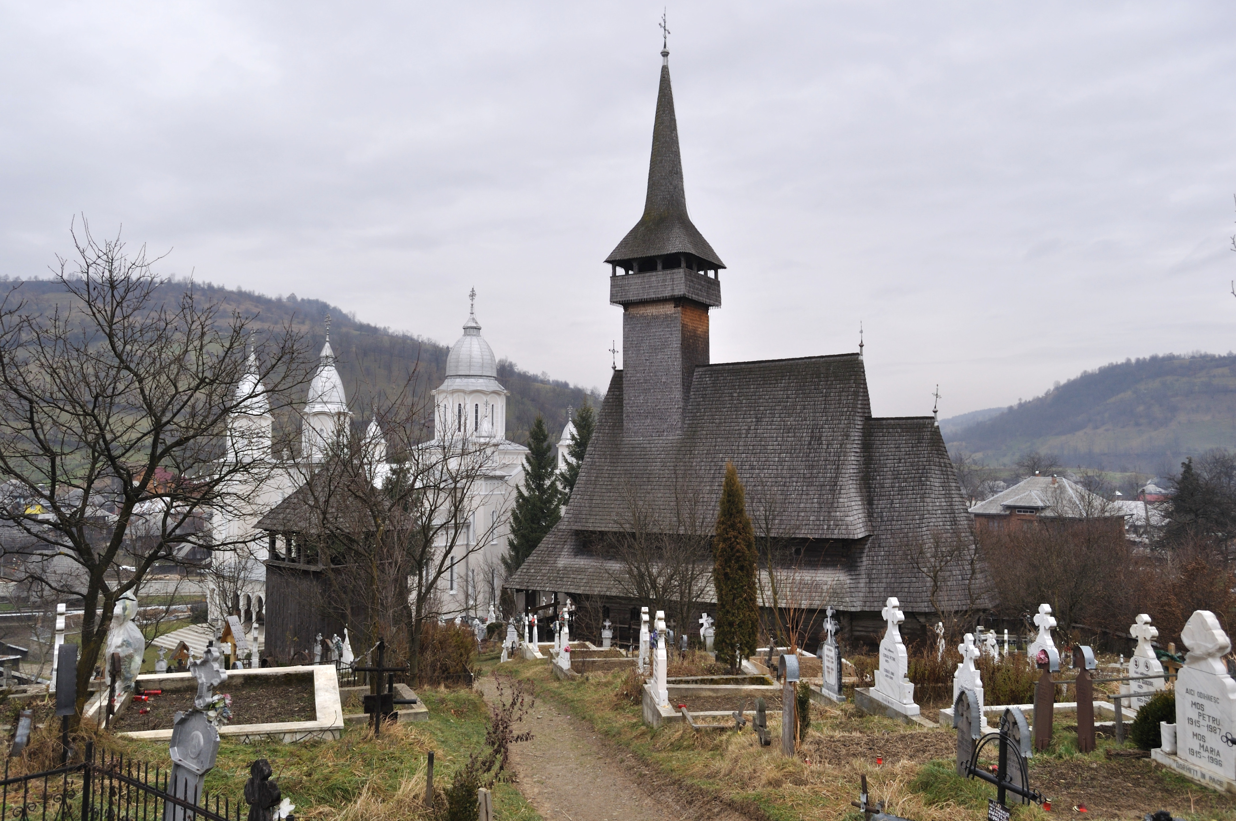 Biserica de lemn „Cuvioasa Paraschiva” din Botiza, județul Maramureș